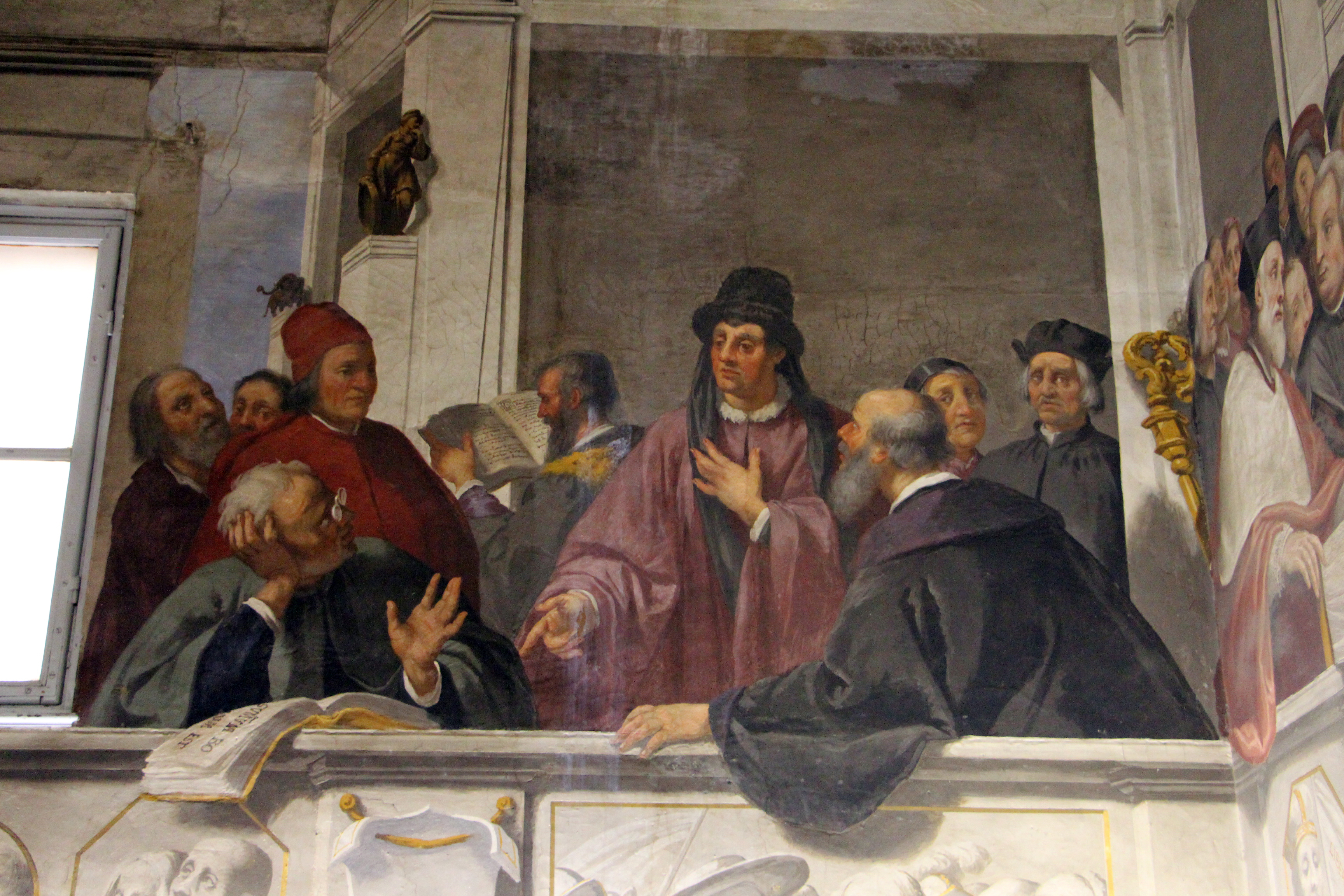 Casa Buonarroti